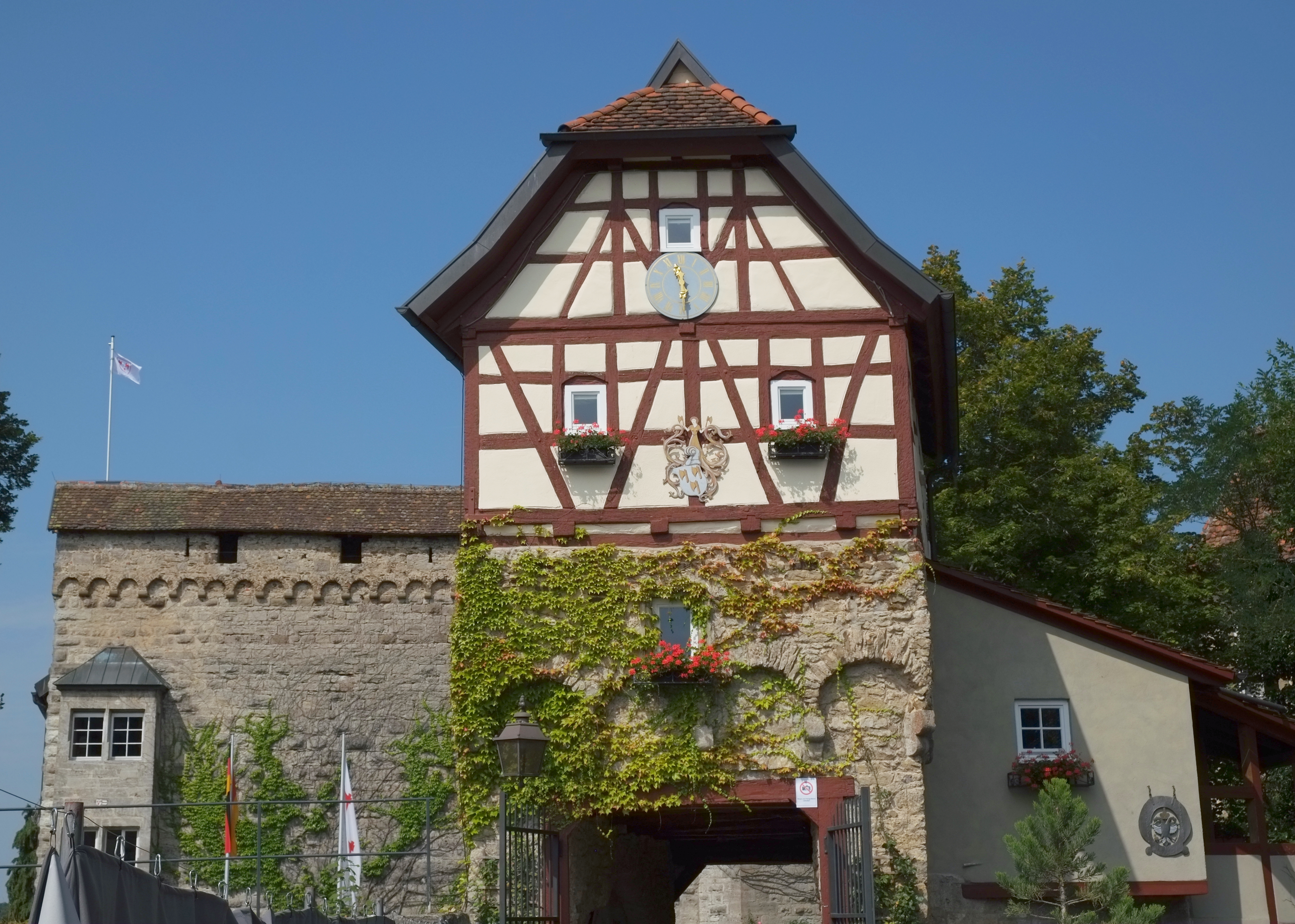 Schloss Stetten (Hohenlohe) im Hohenlohekreis (Baden-Württemberg, Deutschland)